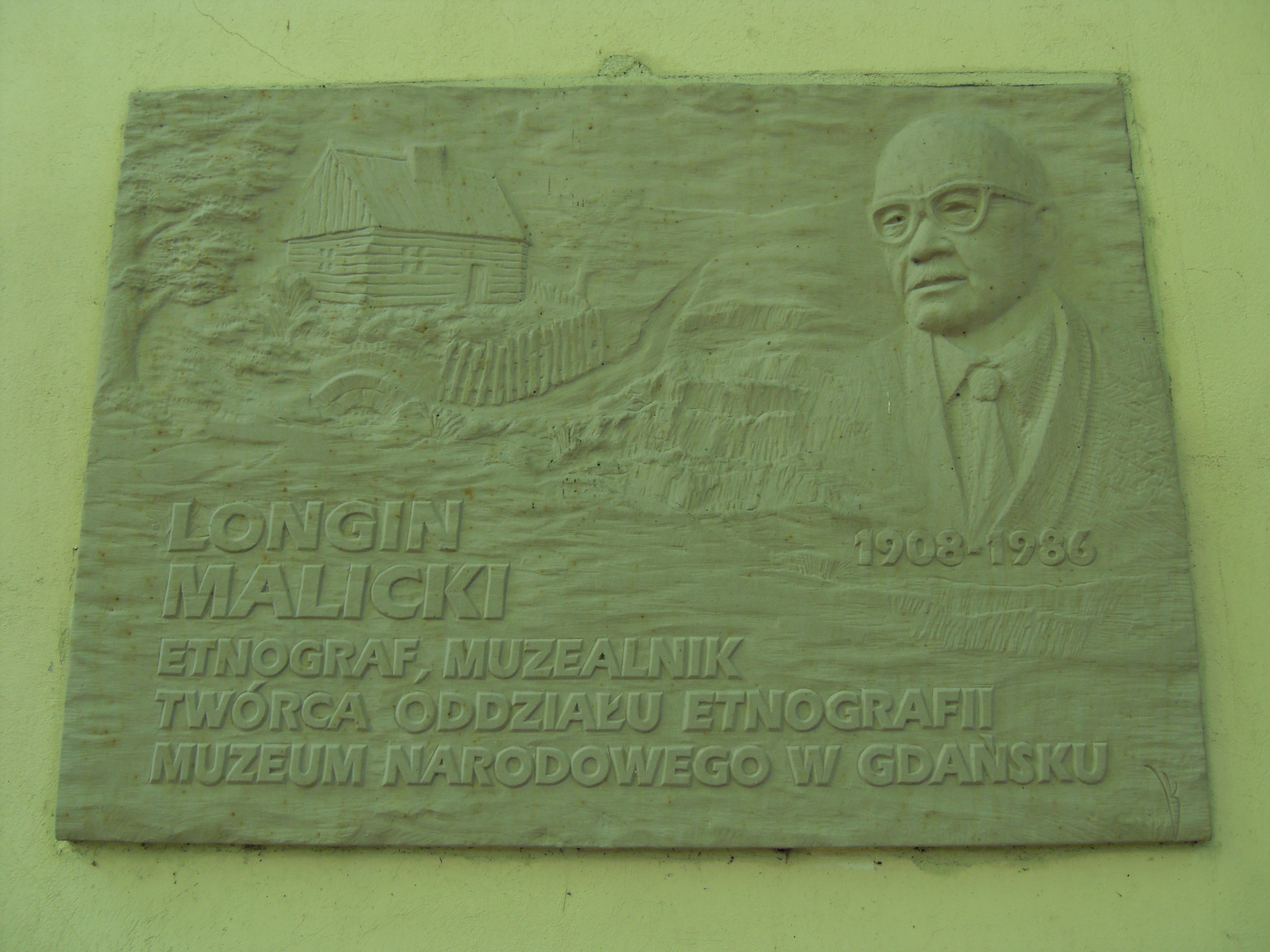 Spichlerz Opacki w Gdańsku Oliwie. Tablica poświęcona Longinowi Malickiemu.